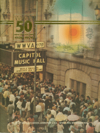 see Image:WWVAJamboree1.jpg